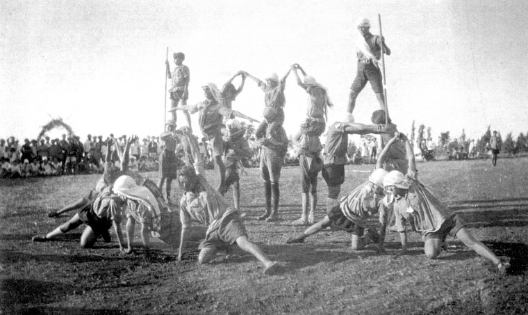 1 במאי 1938 הצגת התעמלות - עפולה/כפר-ילדים/דובדבני